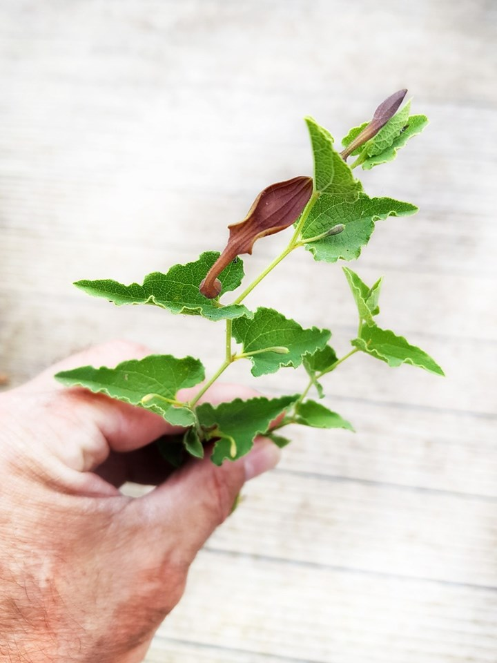 Pistolochia Osterluzei (Aristolochia pistolochia L.), Fundort Bouquet, Südfrankreich, Departemant Gard, Koordinaten 44.170088, 4.270391, 10.Mai 2019